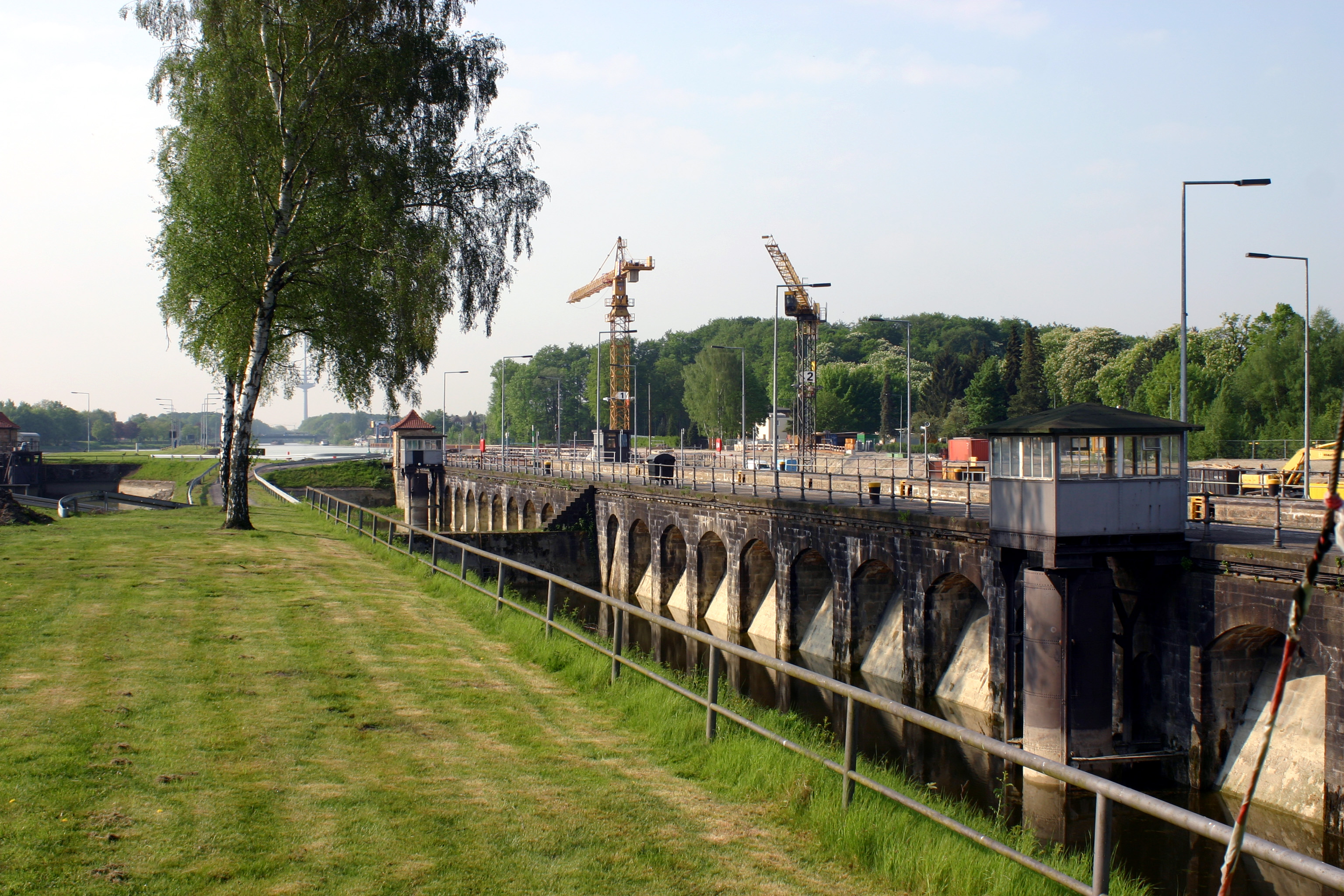 Schleuse Münster